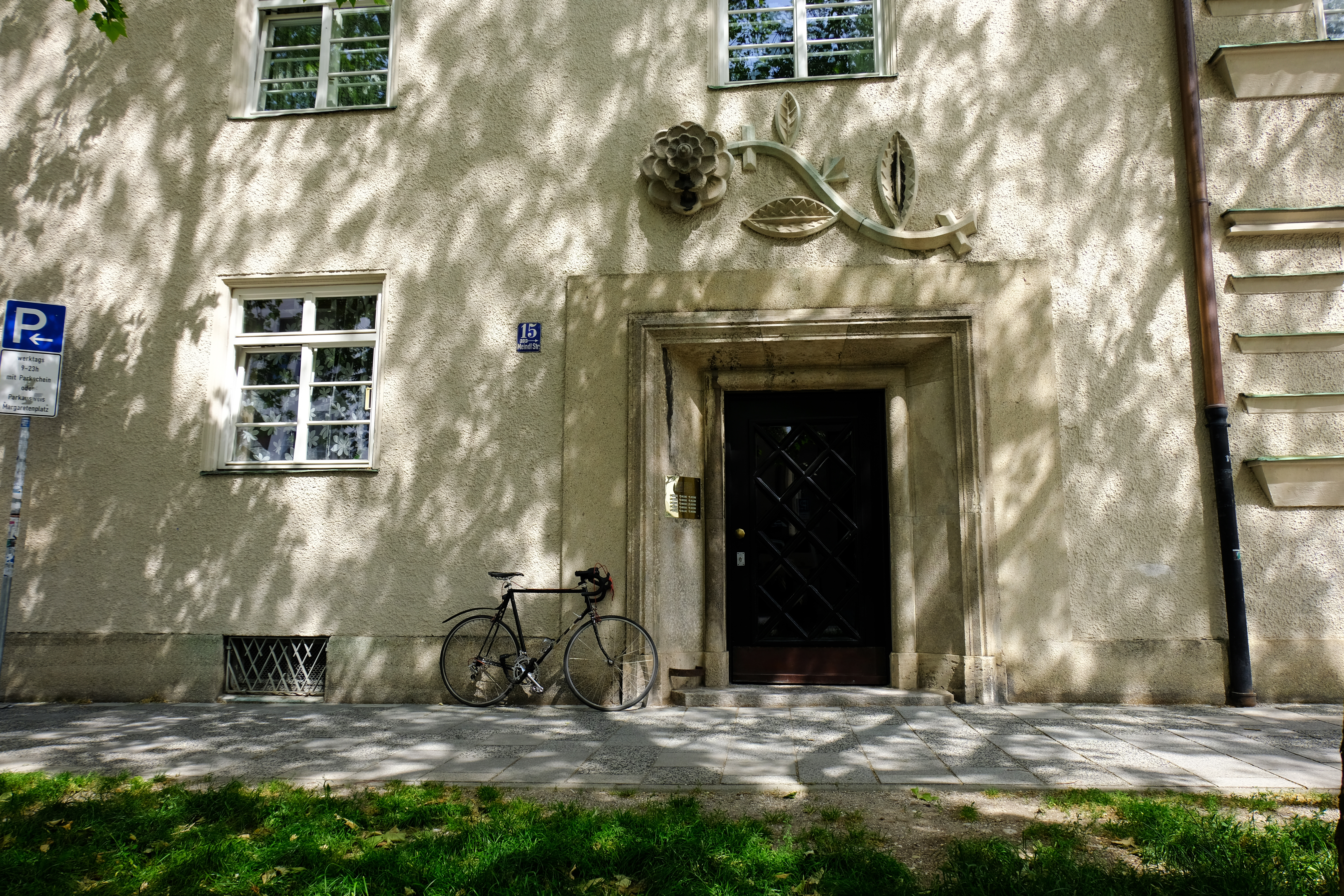 Gebäude an der Meindlstraße 15, erbaut um 1927 nach den Entwürfen von Otho Orlando Kurz und Eduard Herbert